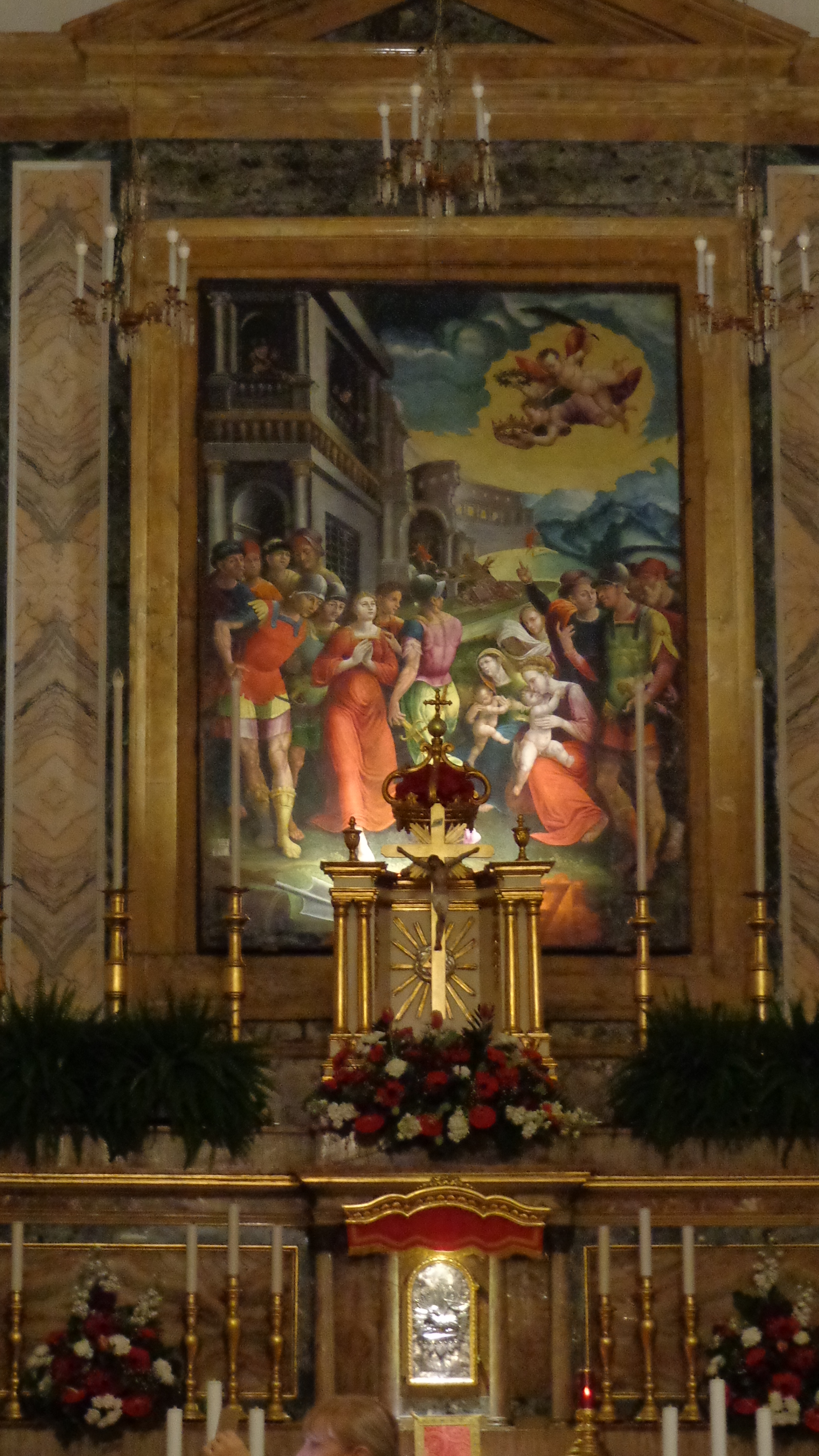 Pala d'Altare. "Sant'Agata condotta al martirio", olio su tavola, autografo con la dicitura "Bernardinus Niger grecus faciebat 1588", opera custodita nella chiesa del Santo carcere di Catania.